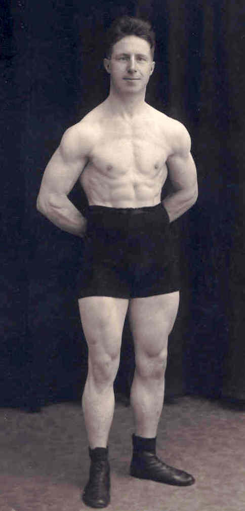 Frans De Haes (1895-1923)